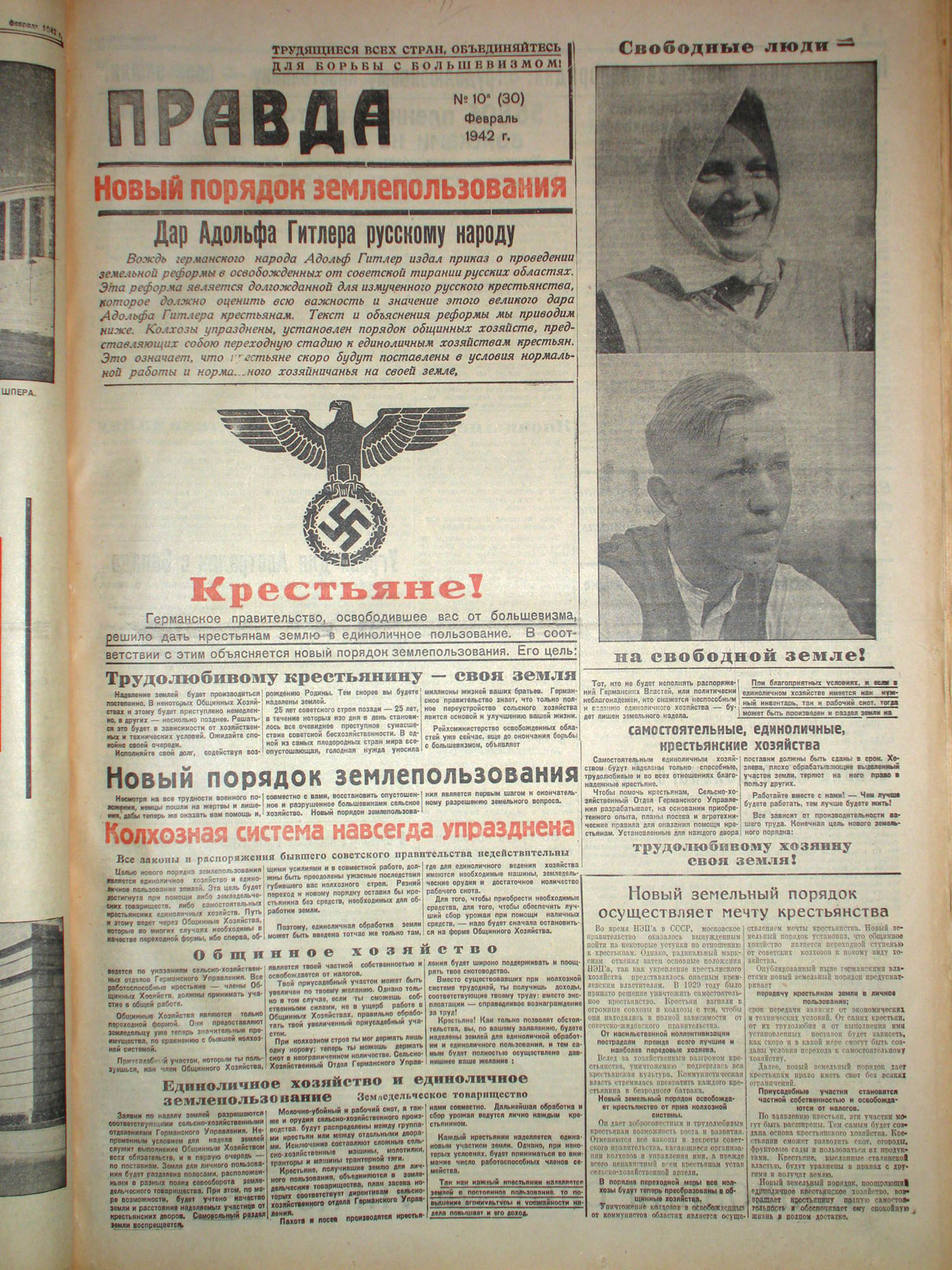 Газета «Правда» (немецкая оккупационная двуцветная газета), нацистская подделка под советскую газету «Правда».